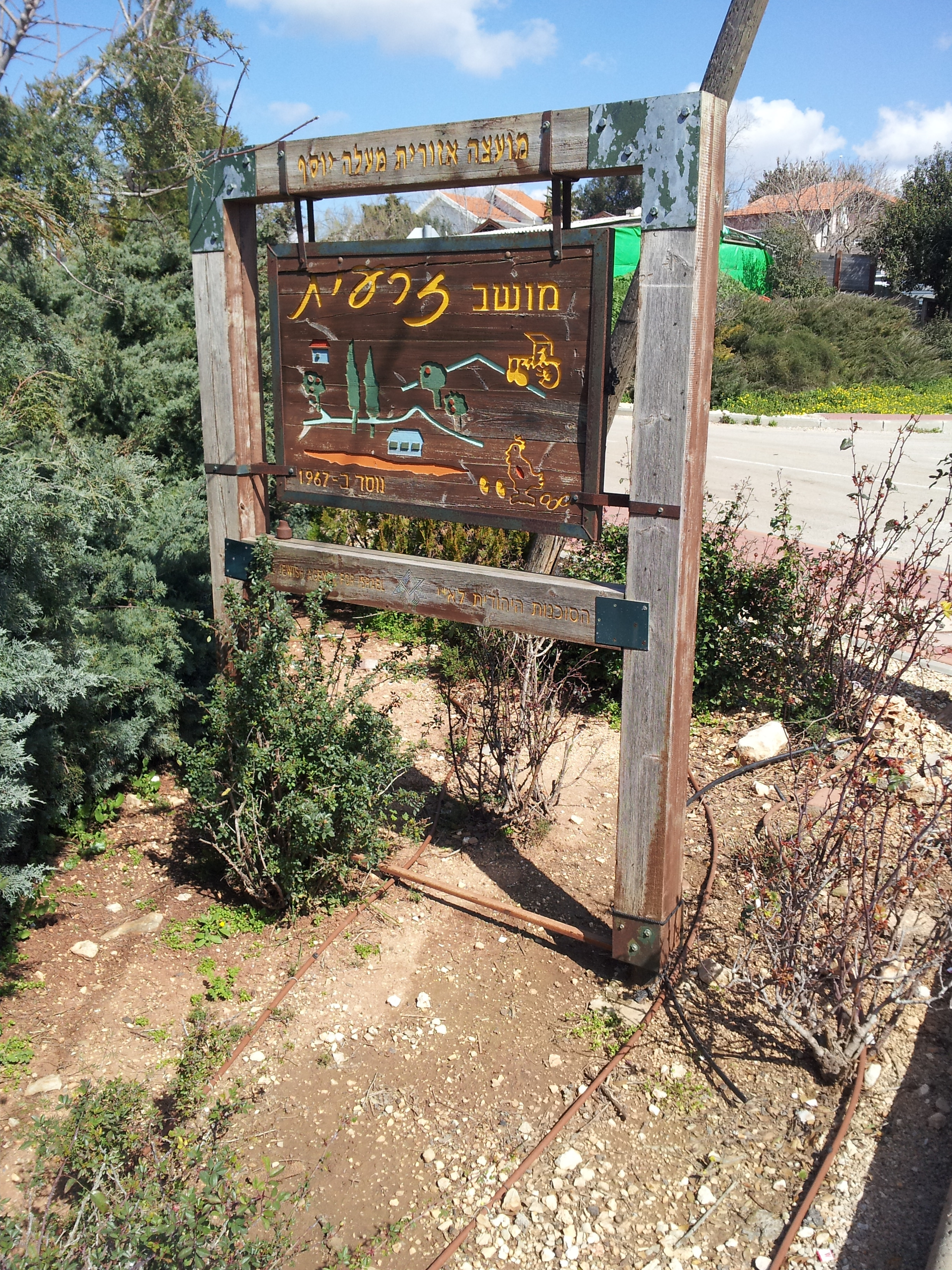 שלט בכניסה ליישוב